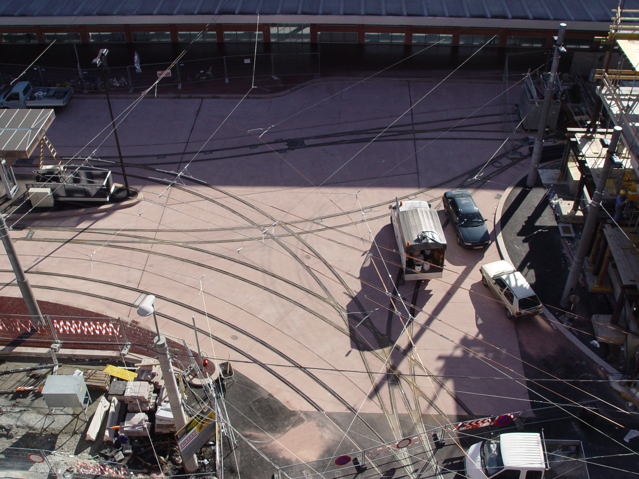 Weichenbaustelle am Innsbrucker Hauptbahnhof für die Regionalbahnerweiterung